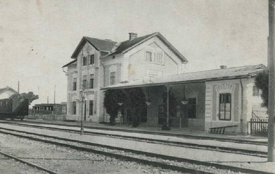 Bahnhof Prijedor. Hinter dem Bahnhofsgebäude befinden sich die Schmalspurgleise.